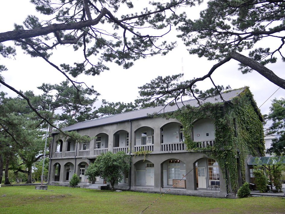 花蓮市松園別館